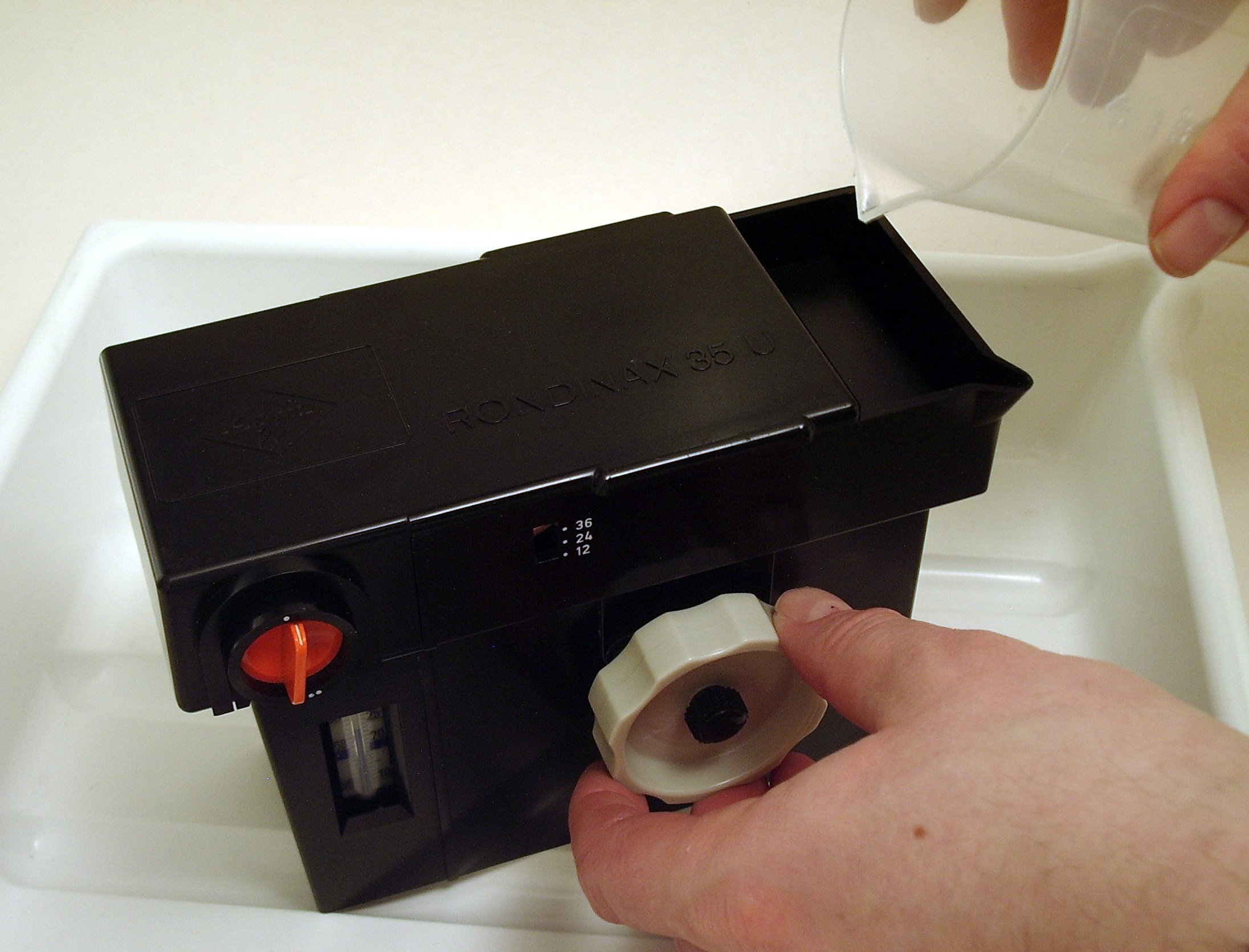 Agfa Rondinax 35 U / Filmentwickler eingiessen- Agfa Rondinax 35 U / Filling in the developer solution.